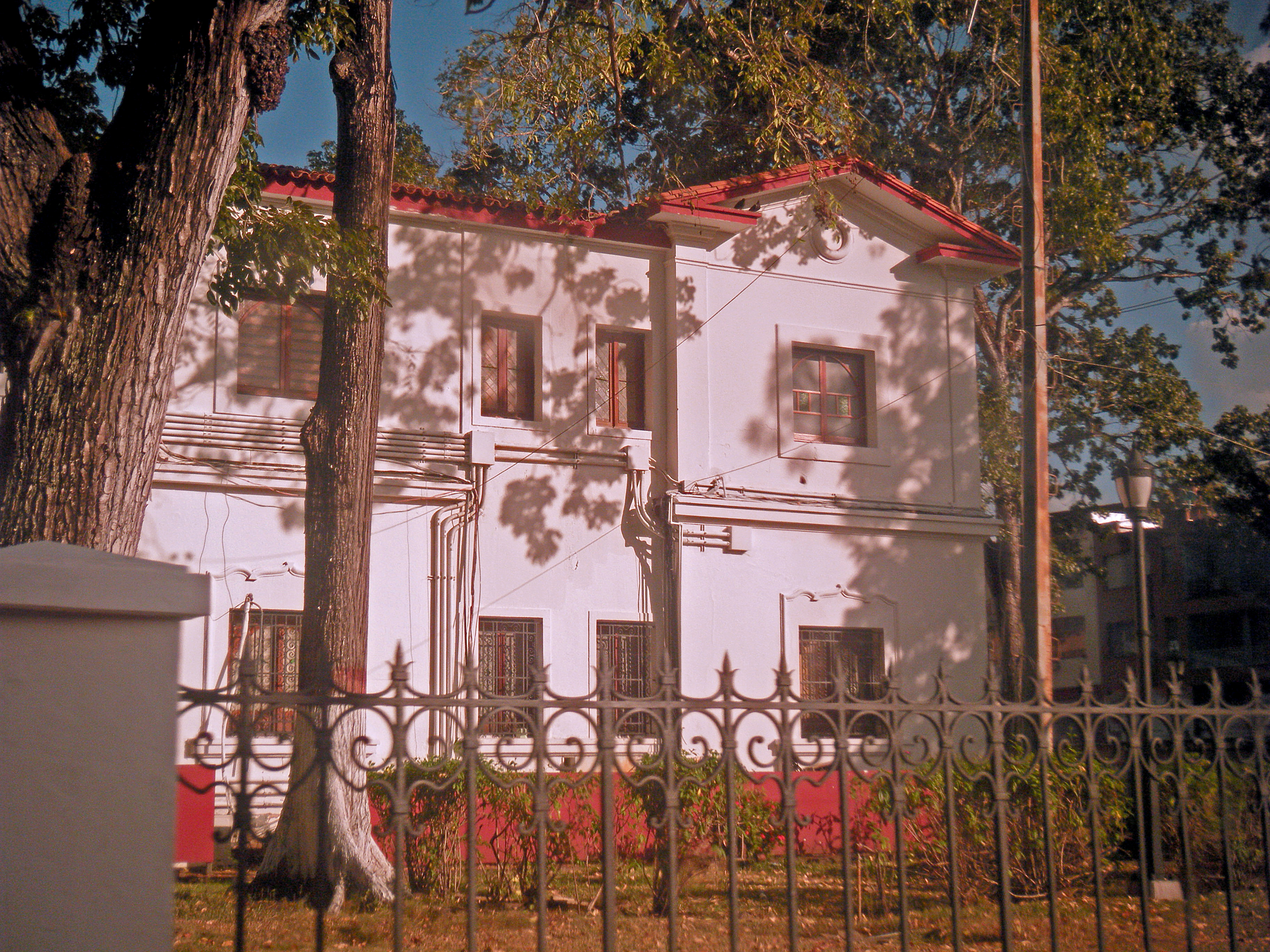 Parte del edificio de la Gobernación del Estado Monagas, en MAturín. Venezuela.